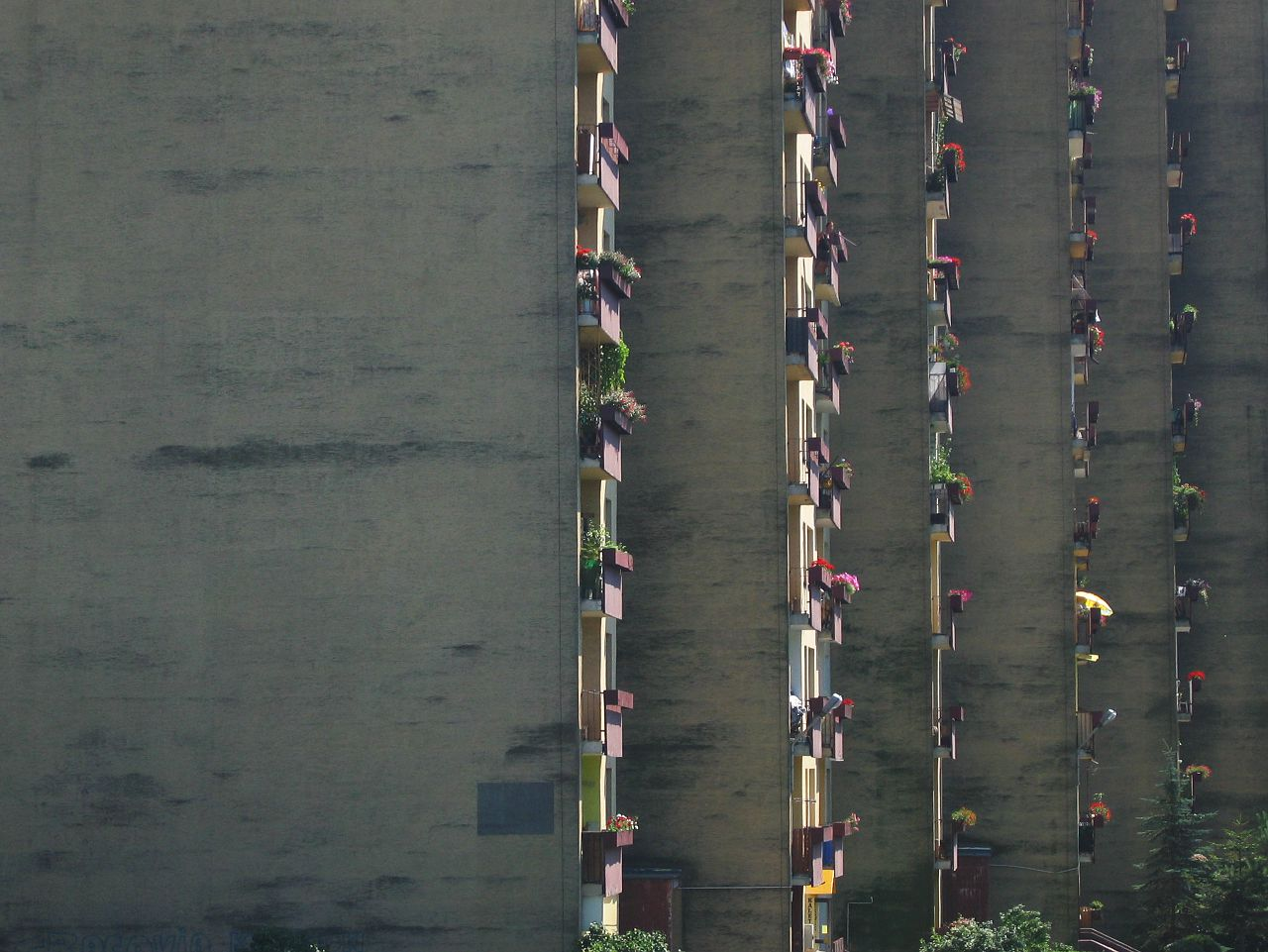 Tyskie blokowisko.